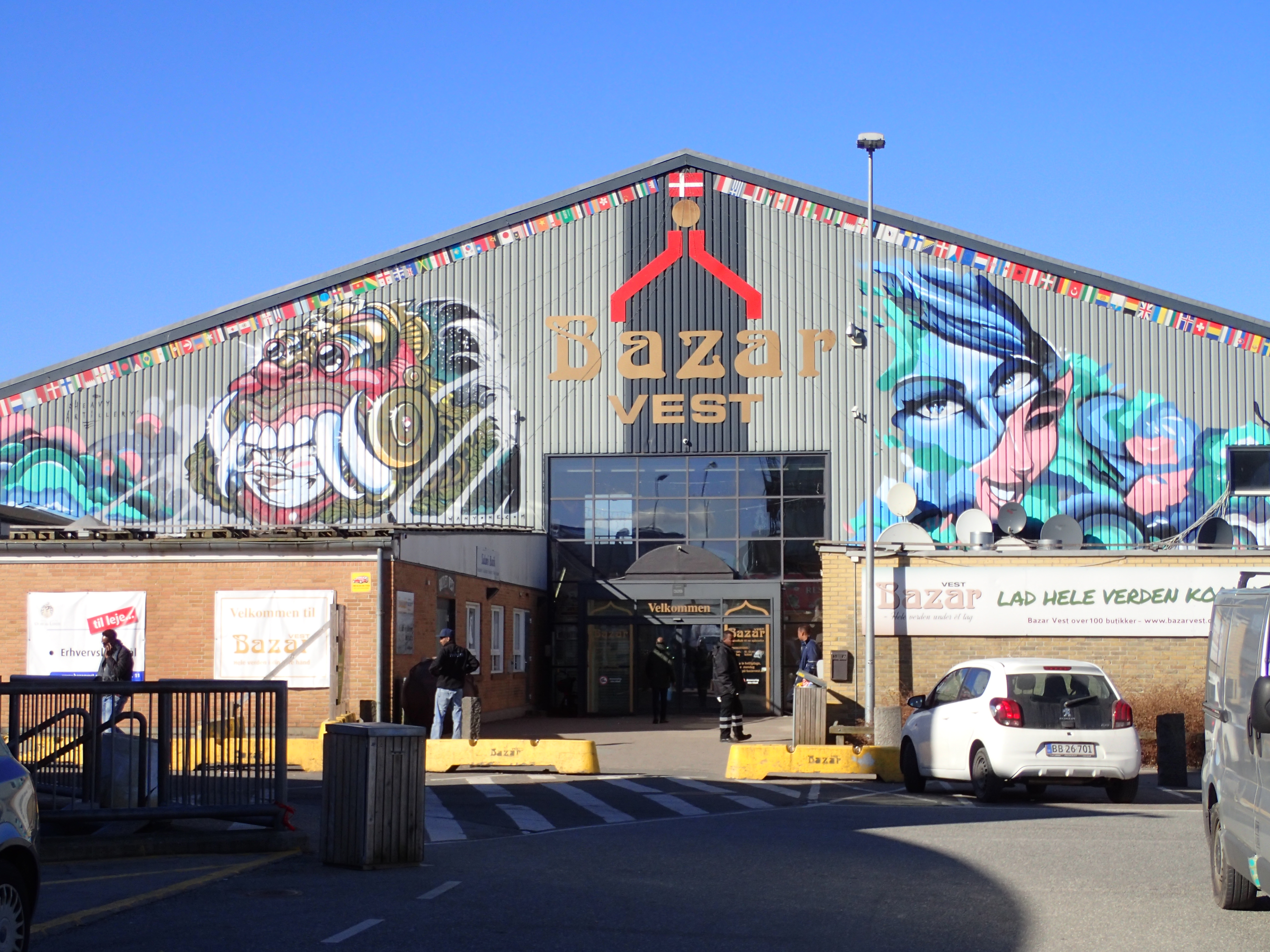 Bazar Vest, hovedindgang.